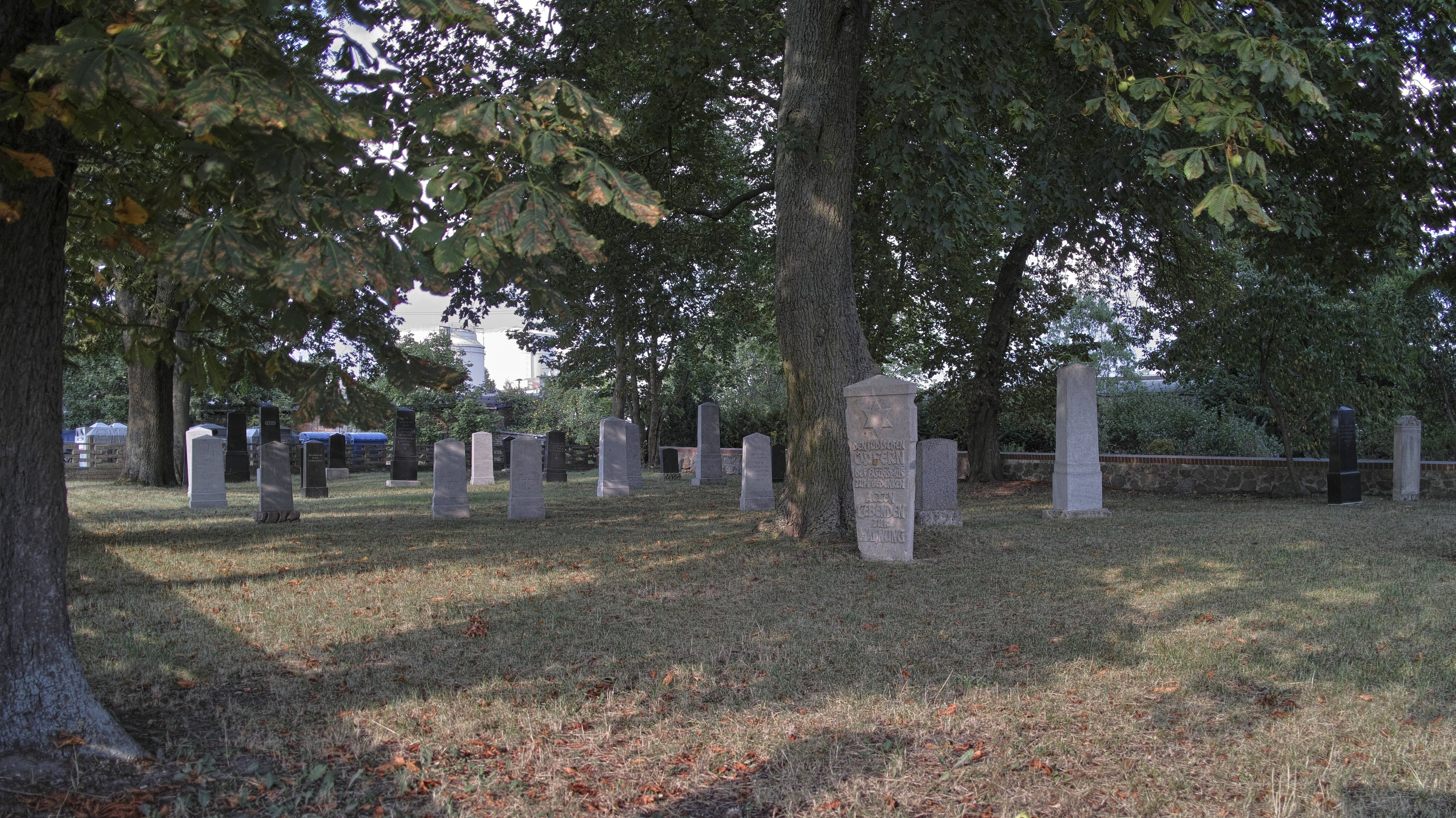 Jüdischer Friedhof Anklam. Blick vom Eingangstor. Im Hintergrund die Zuckerfabrik